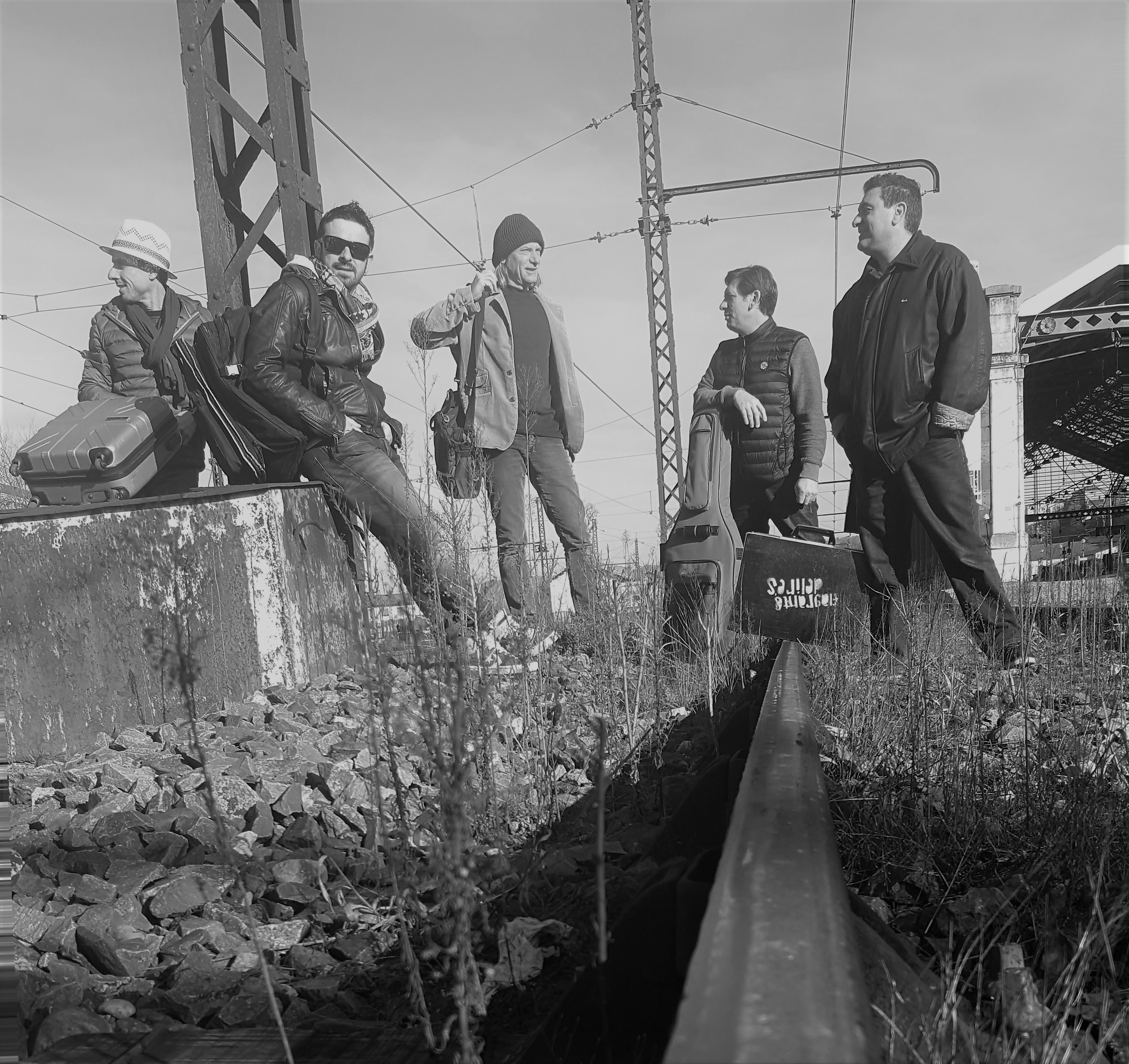 Photo presse FLAGRANTS DÉLIRES